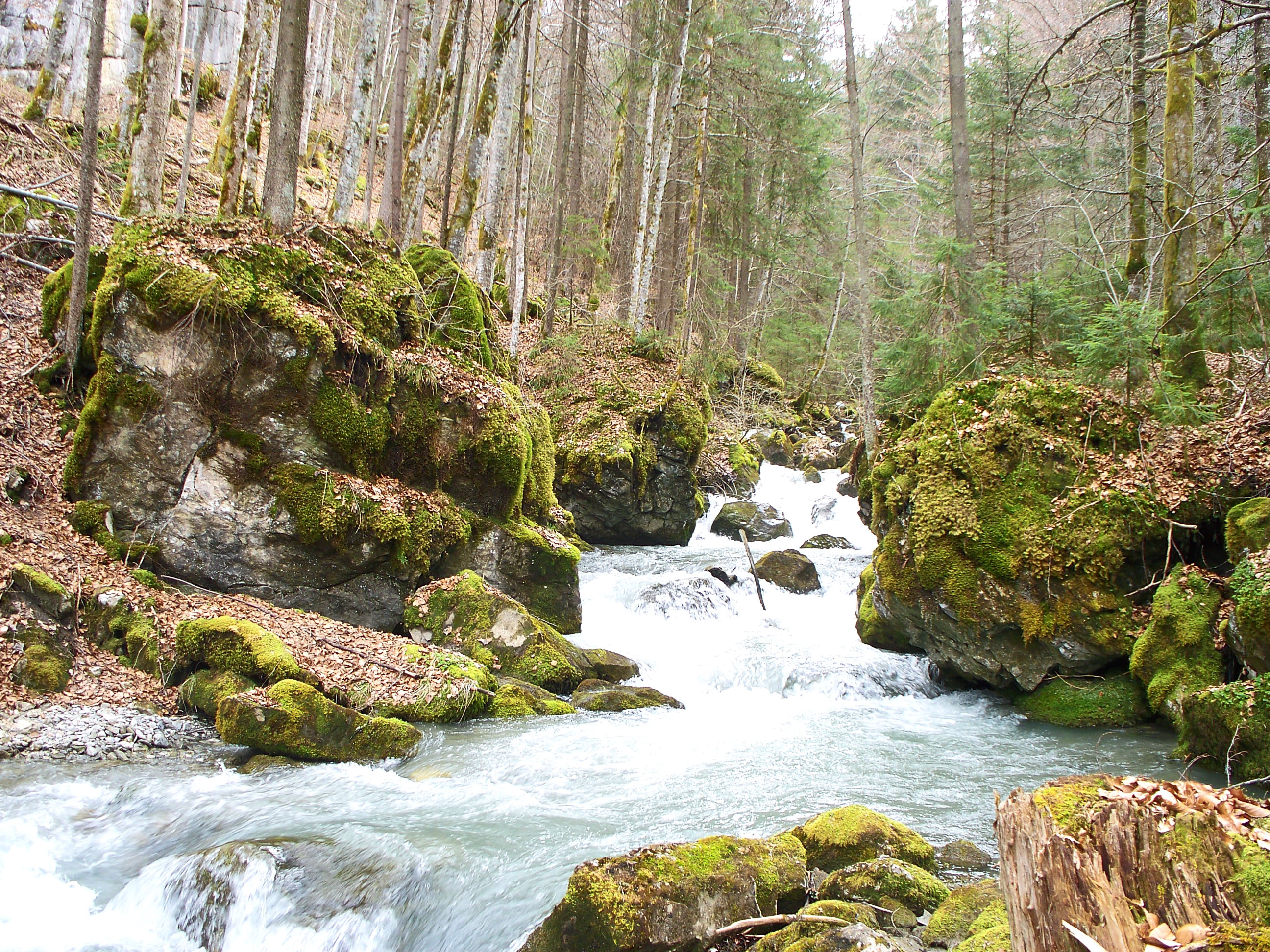 Le torrent du Bronze, en crue